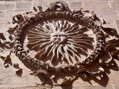 Escudo del Obispo Portocarrero, esculpido en la fachada de la Catedral de Almería.